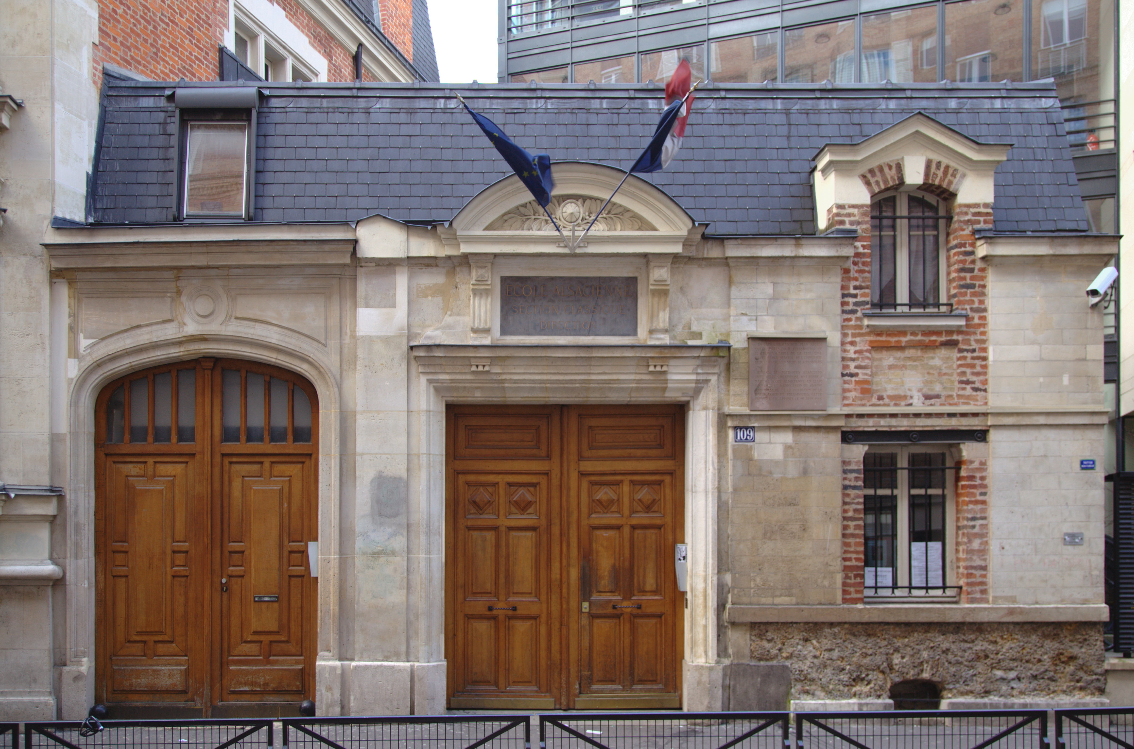 L'entrée de l'école alsacienne à Paris au numéro 109 de la rue Notre-Dame-des-Champs